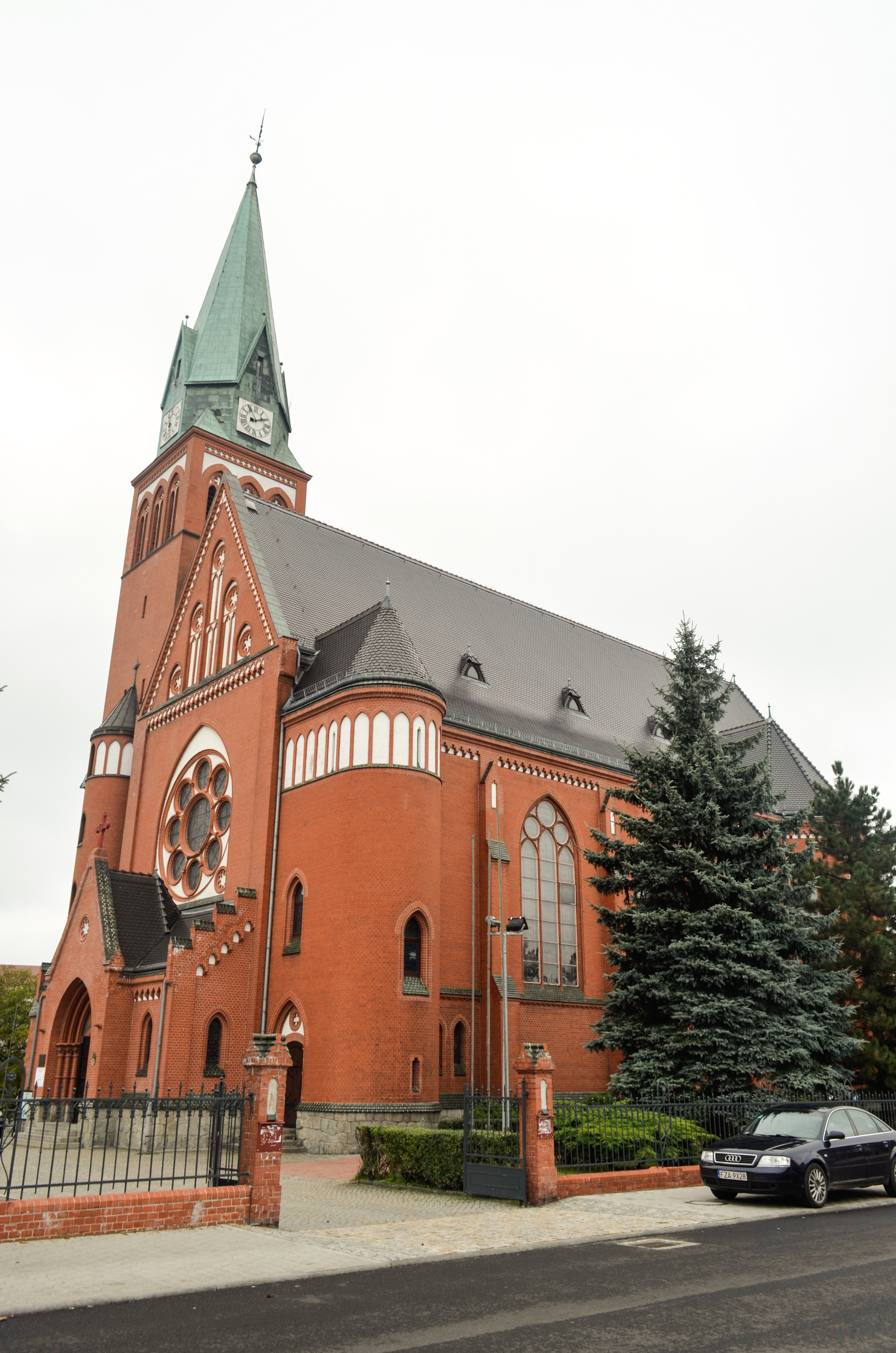 Żary, ul. 11 Listopada 30 - kościół parafialny p.w. Wniebowzięcia NMP, 1914-1917